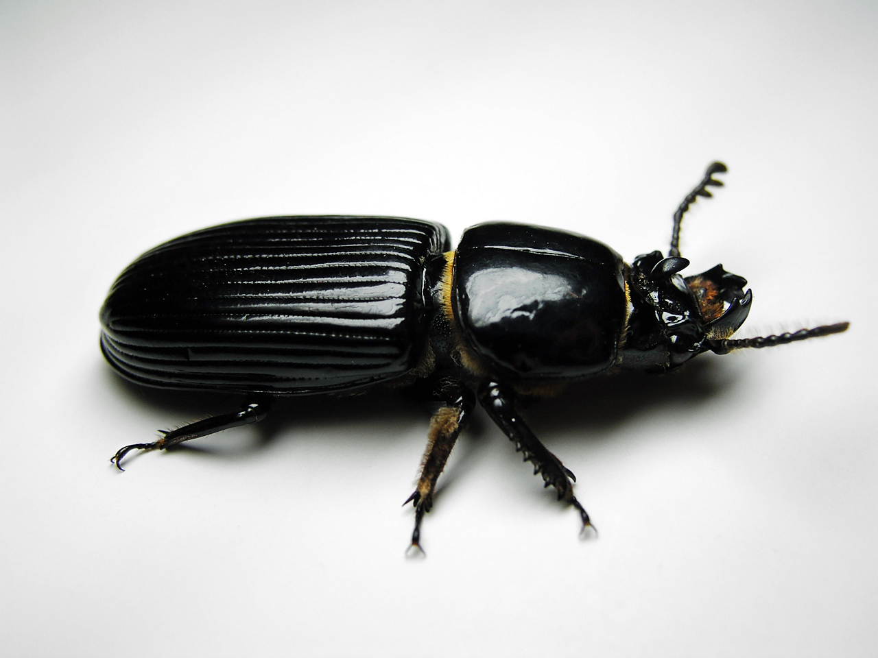 Super Hissing Beetle Passalidae Bess Beetle